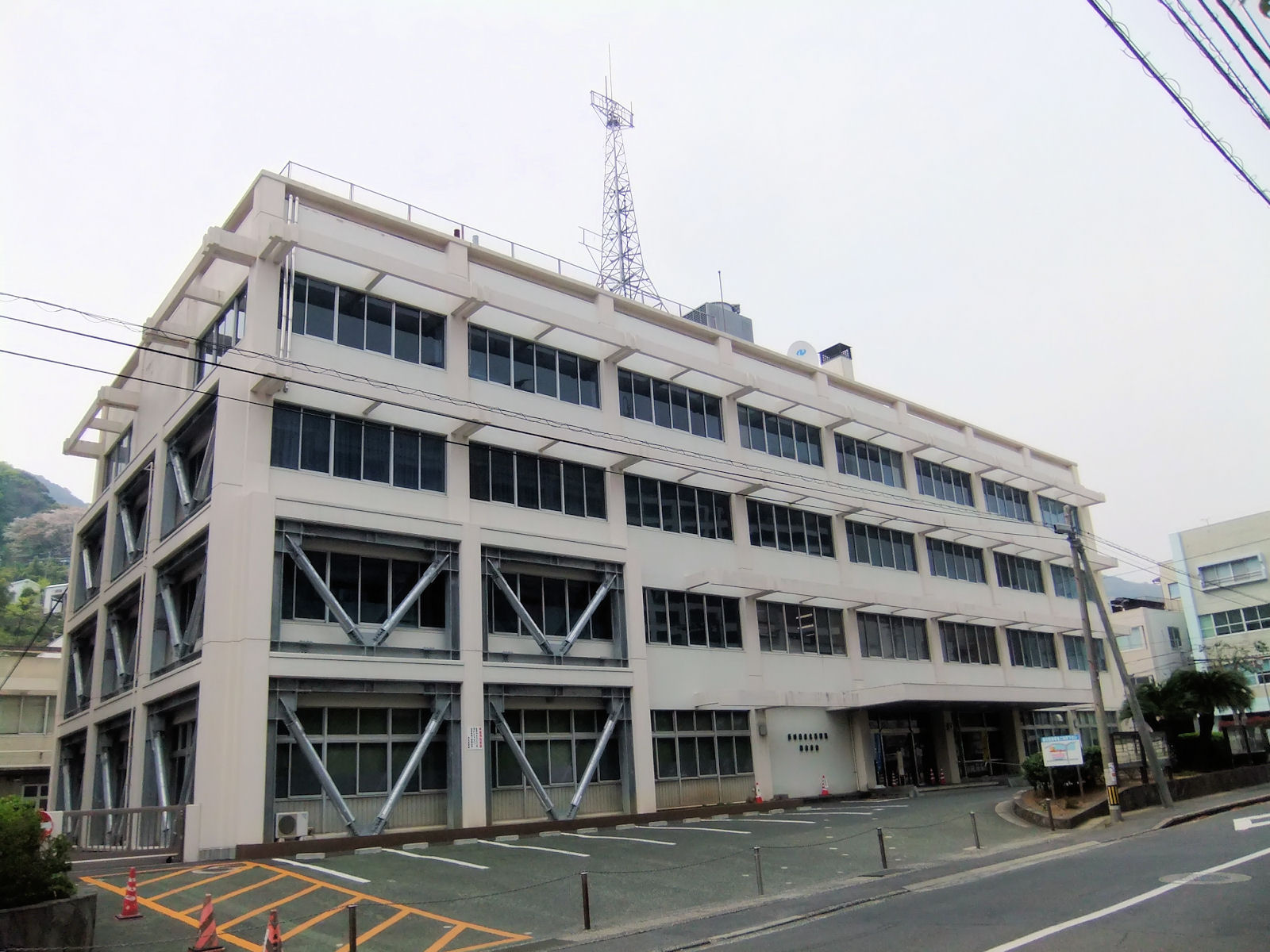 長崎県県北振興局庁舎